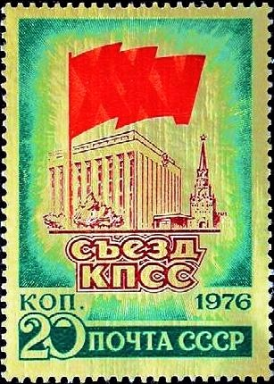 Почтовая марка СССР. 1976. XXV съезд КПСС. Дворец съездов в Кремле. Номер в каталоге ЦФА 4555